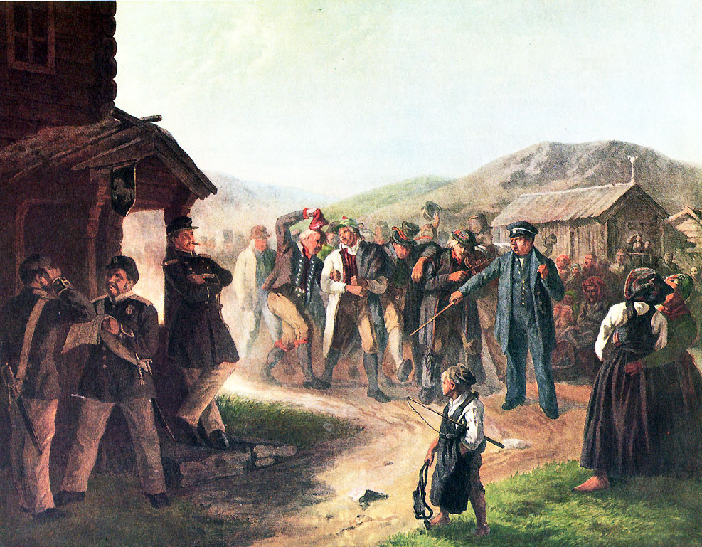 Beväringsgossar i Dalarna